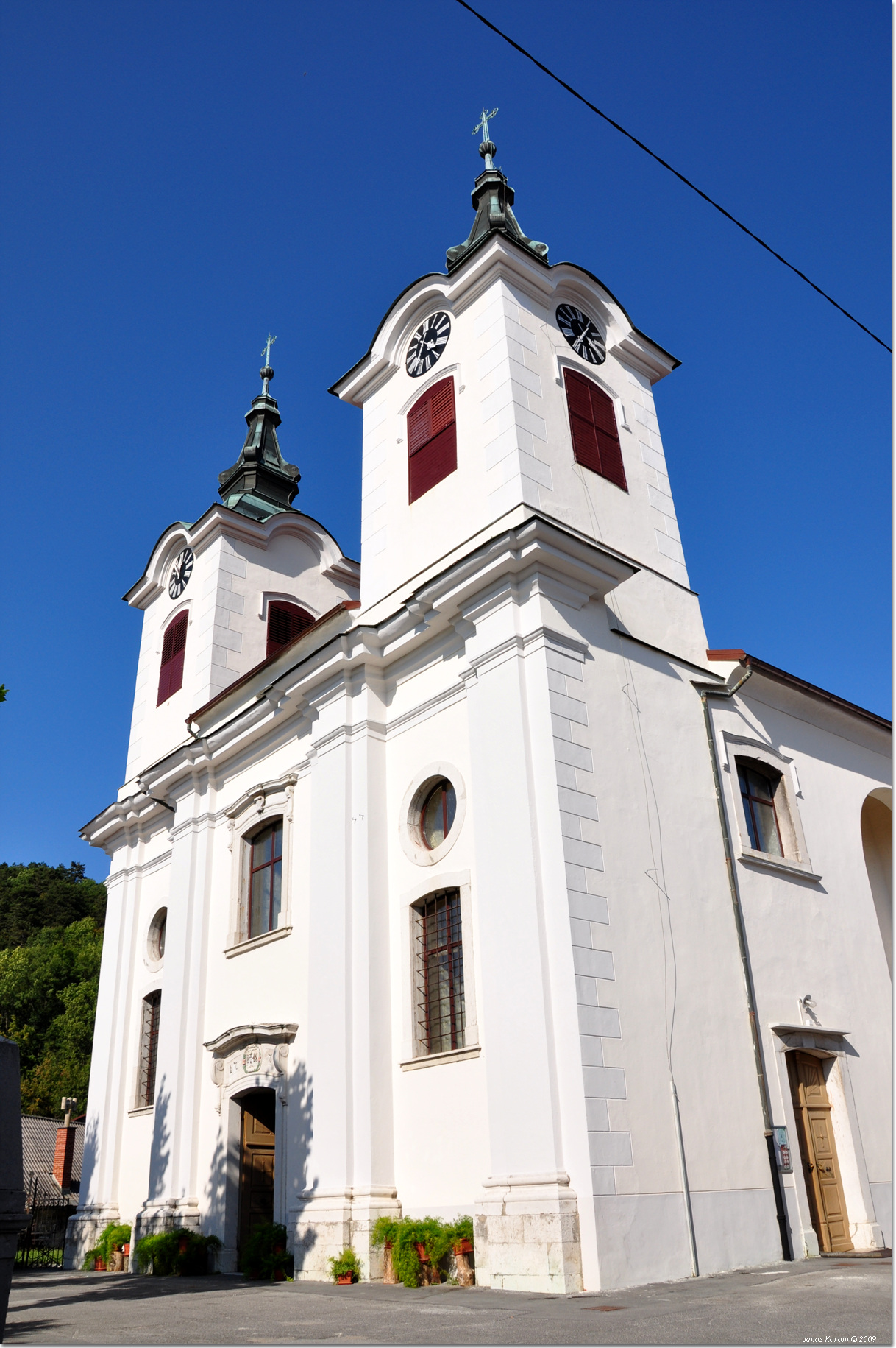 Postojna (96)